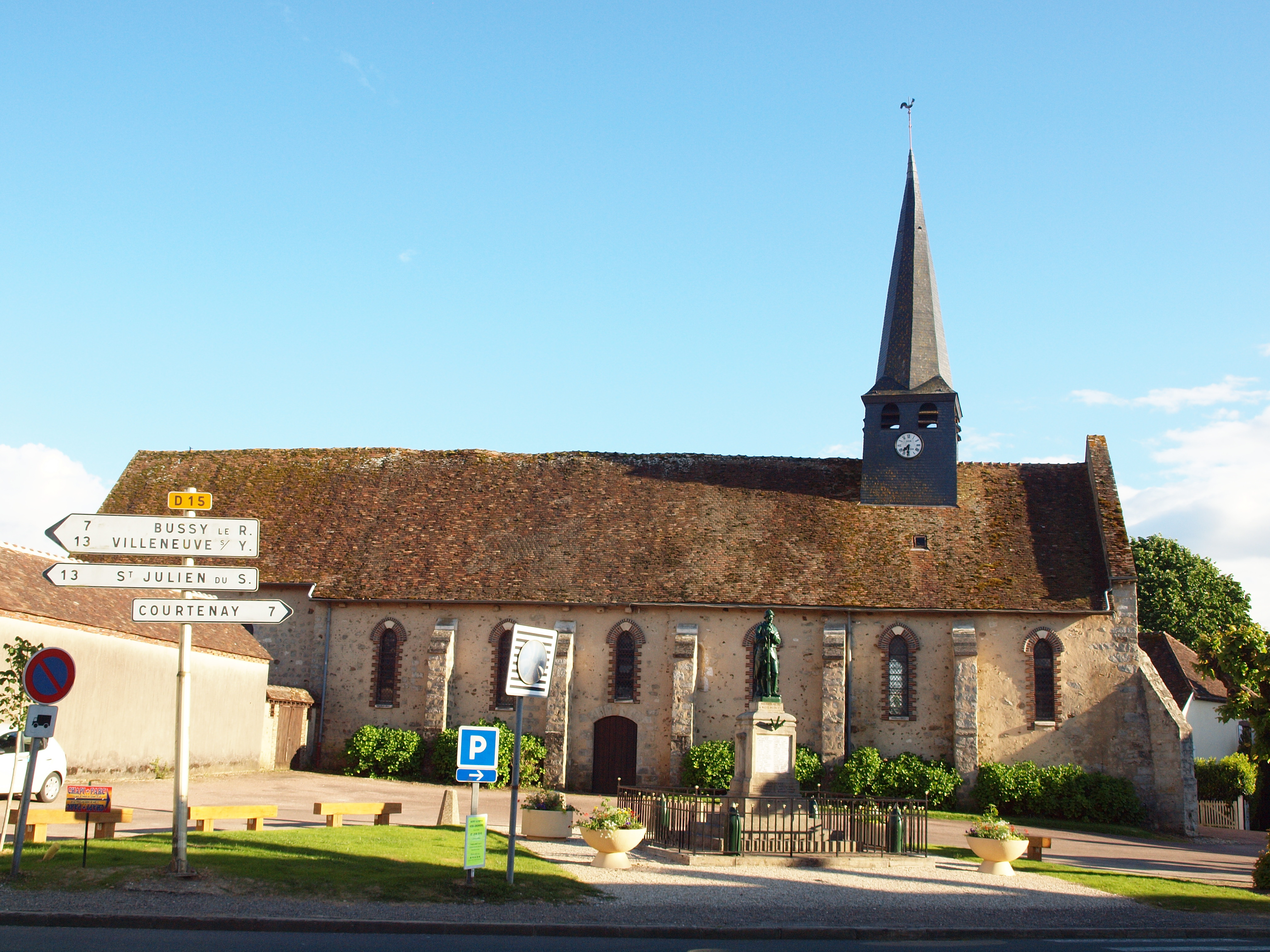 Piffonds (Yonne, France) ; église